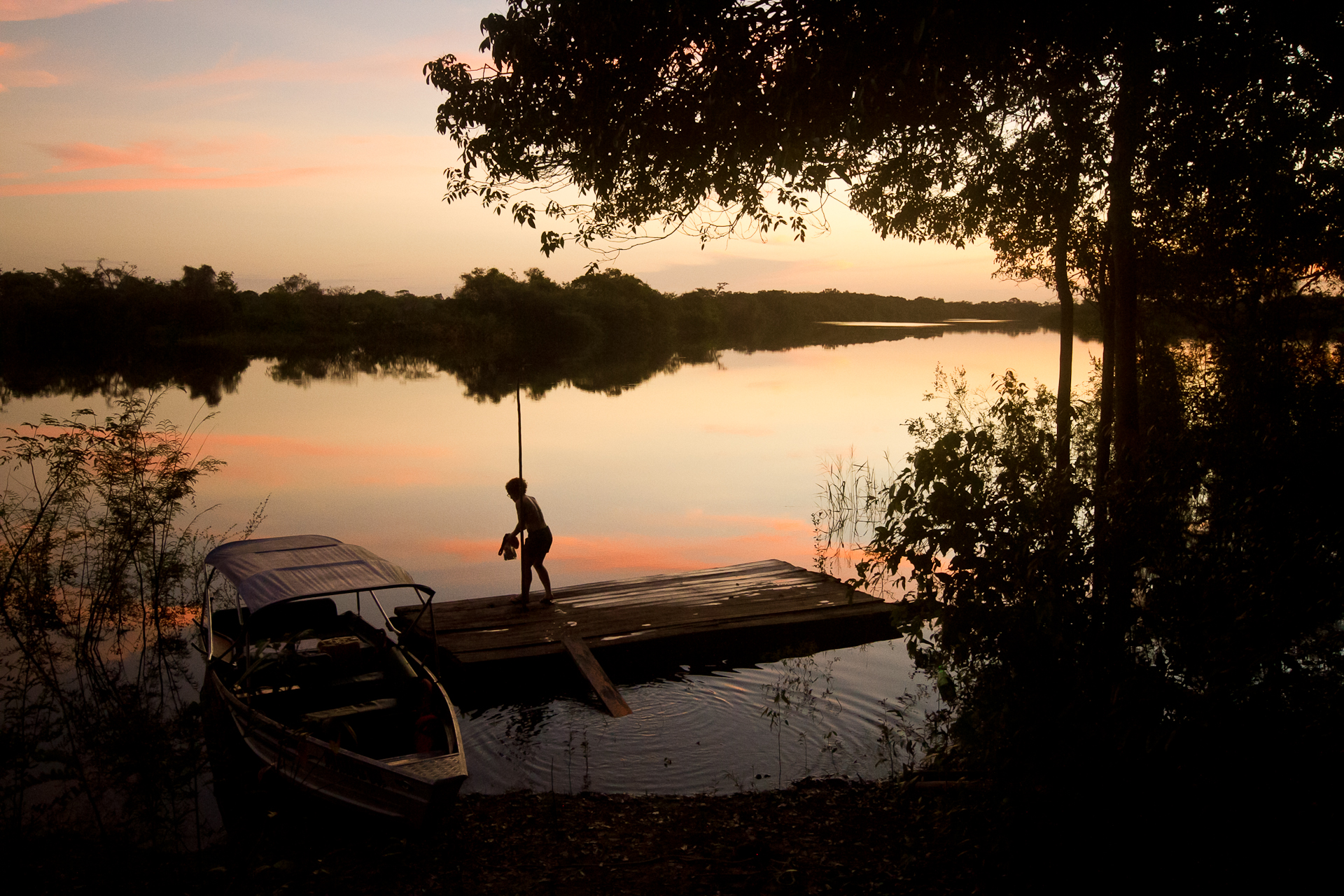 Ambientalista sobe em balsa próximo à base Tiaracá no Parque Nacional do Jaú